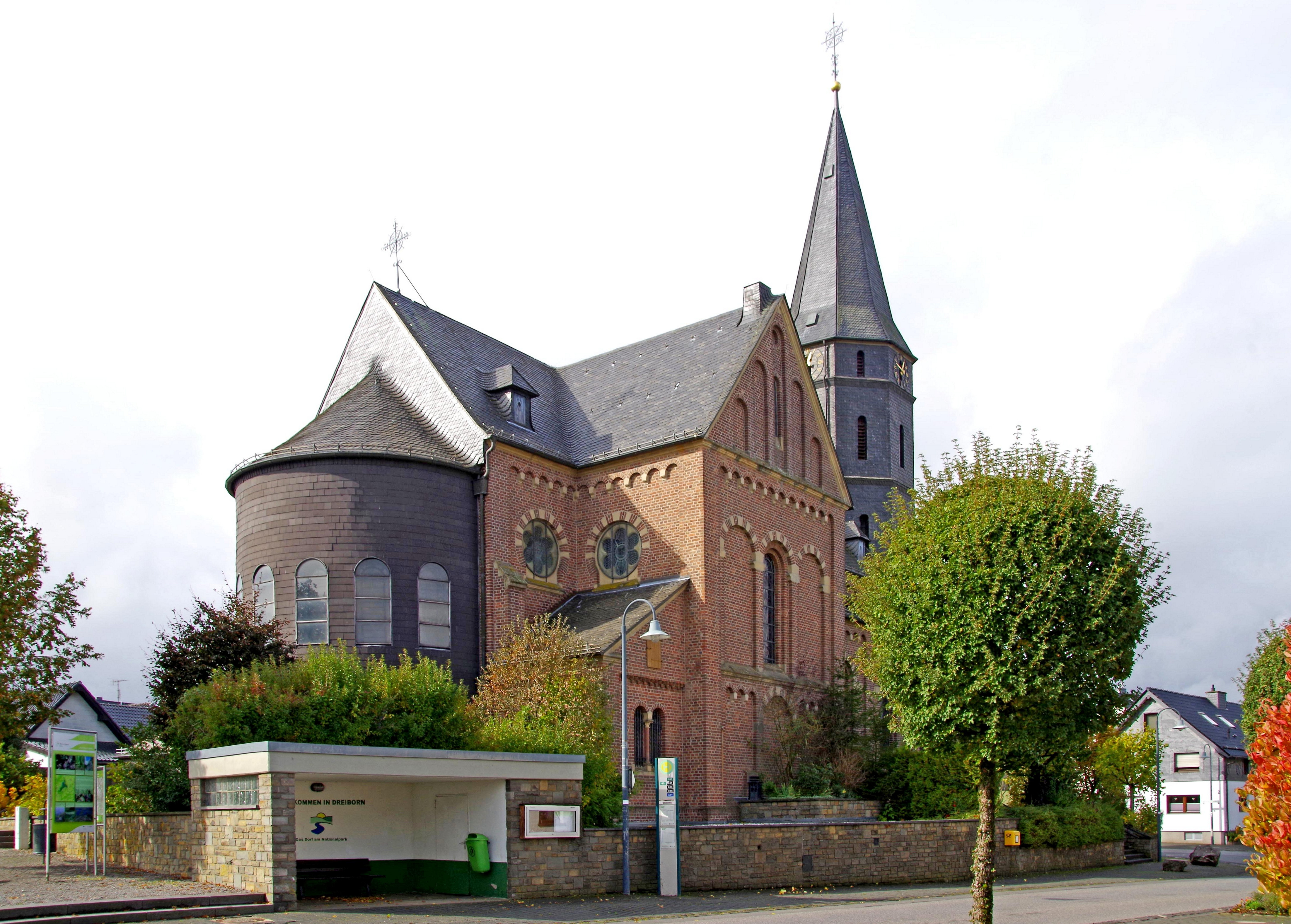 St. Georg (Dreiborn), Außenansicht